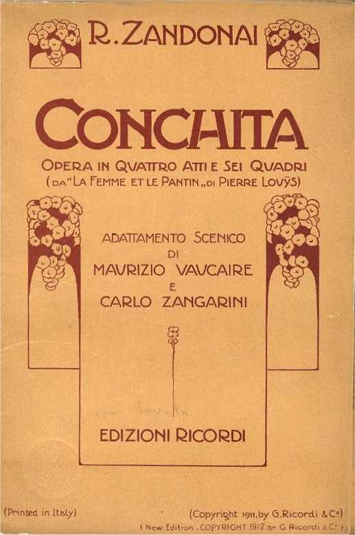 Copertina libretto "Conchita"opera in quattro atti e sei quadri (da "La Femme et Le Pantin" di Pierre Louys) musica di Riccardo Zandonai - adattamento scenico di Maurizio Vavcaire e Carlo Zangarini - G. Ricordi & C. - Milano